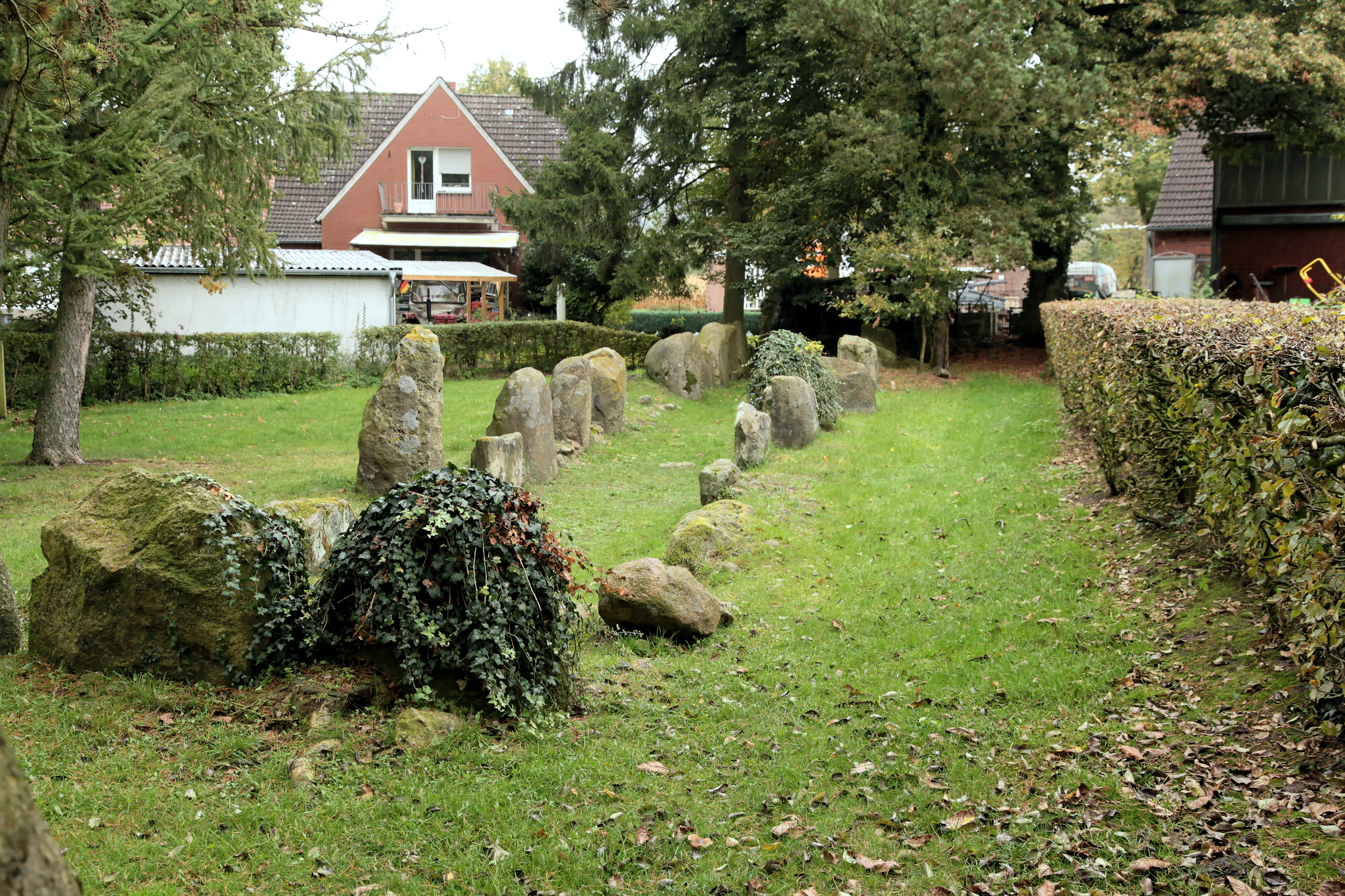 Großsteingrab Lengerich-Wechte I, Brochterbecker Straße in Lengerich